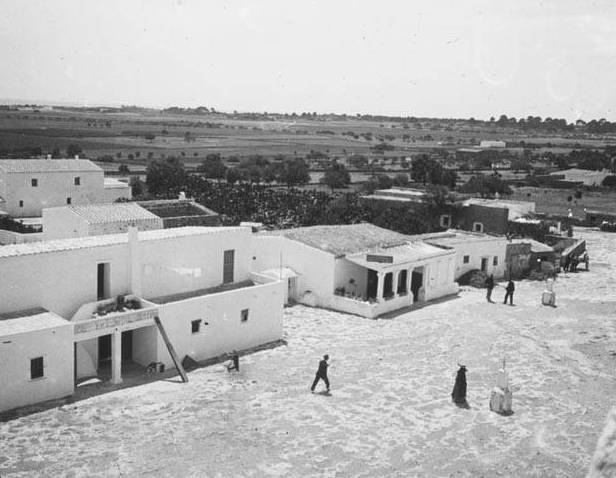 Imatge